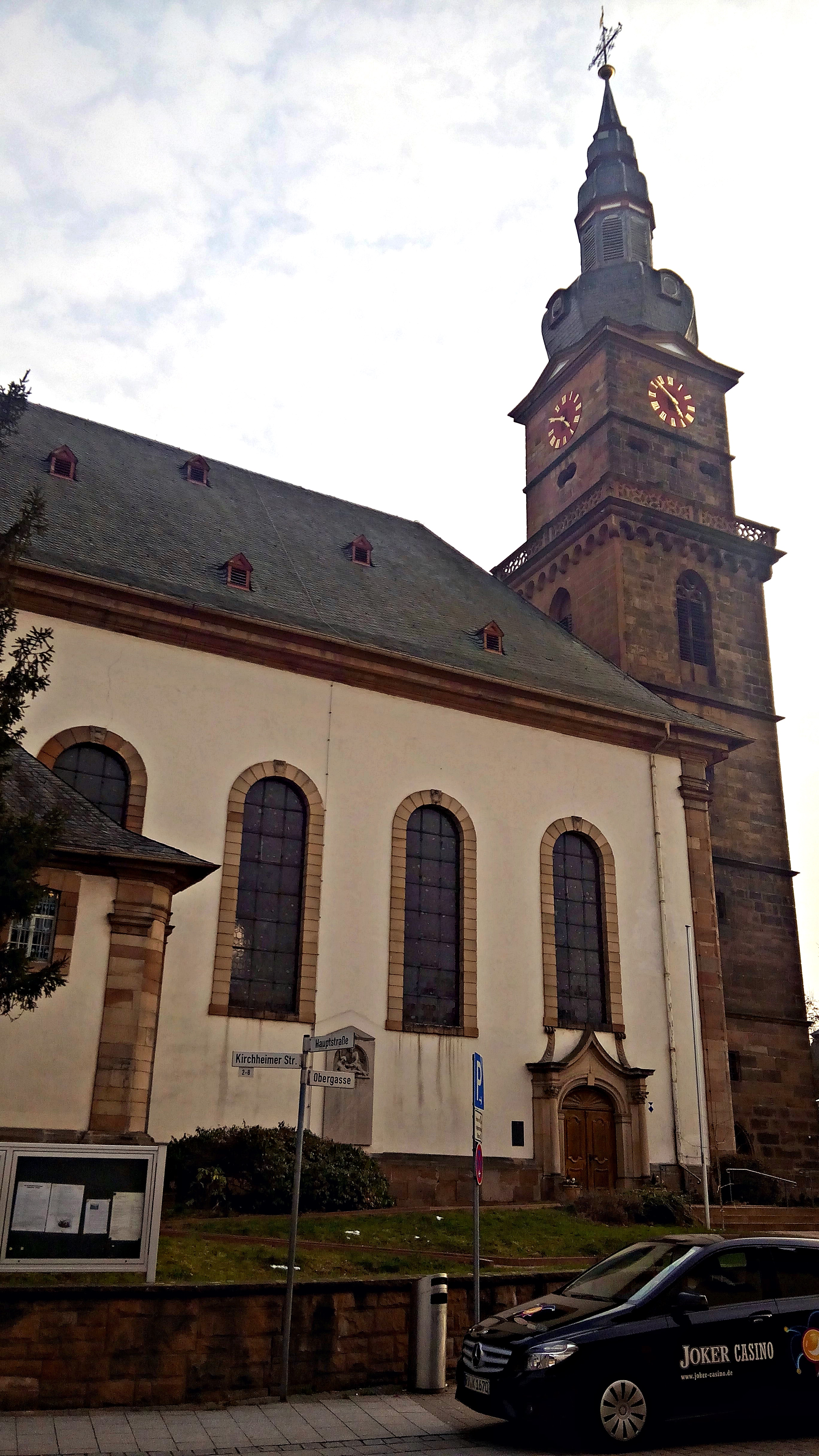 Martinskirche Grünstadt von nordost